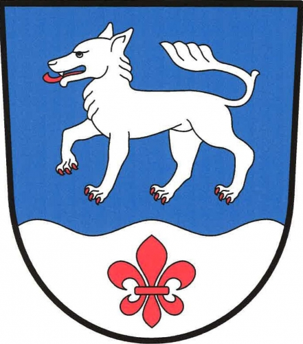 znak, Vlčeves, okres Tábor